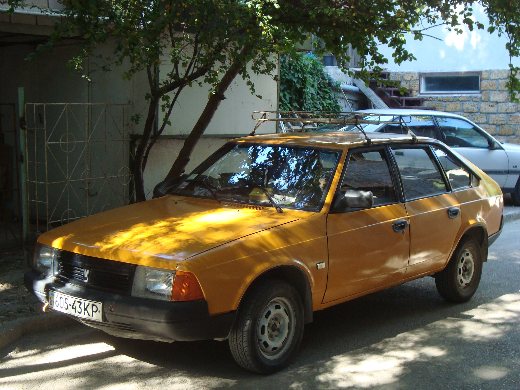 Автомобіль Москвич у Форосі